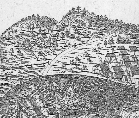 "Belaggerung der / Stadt Villingen. / A° 1704.", oben der Magdalenenberg mit Lothringer Kreuz